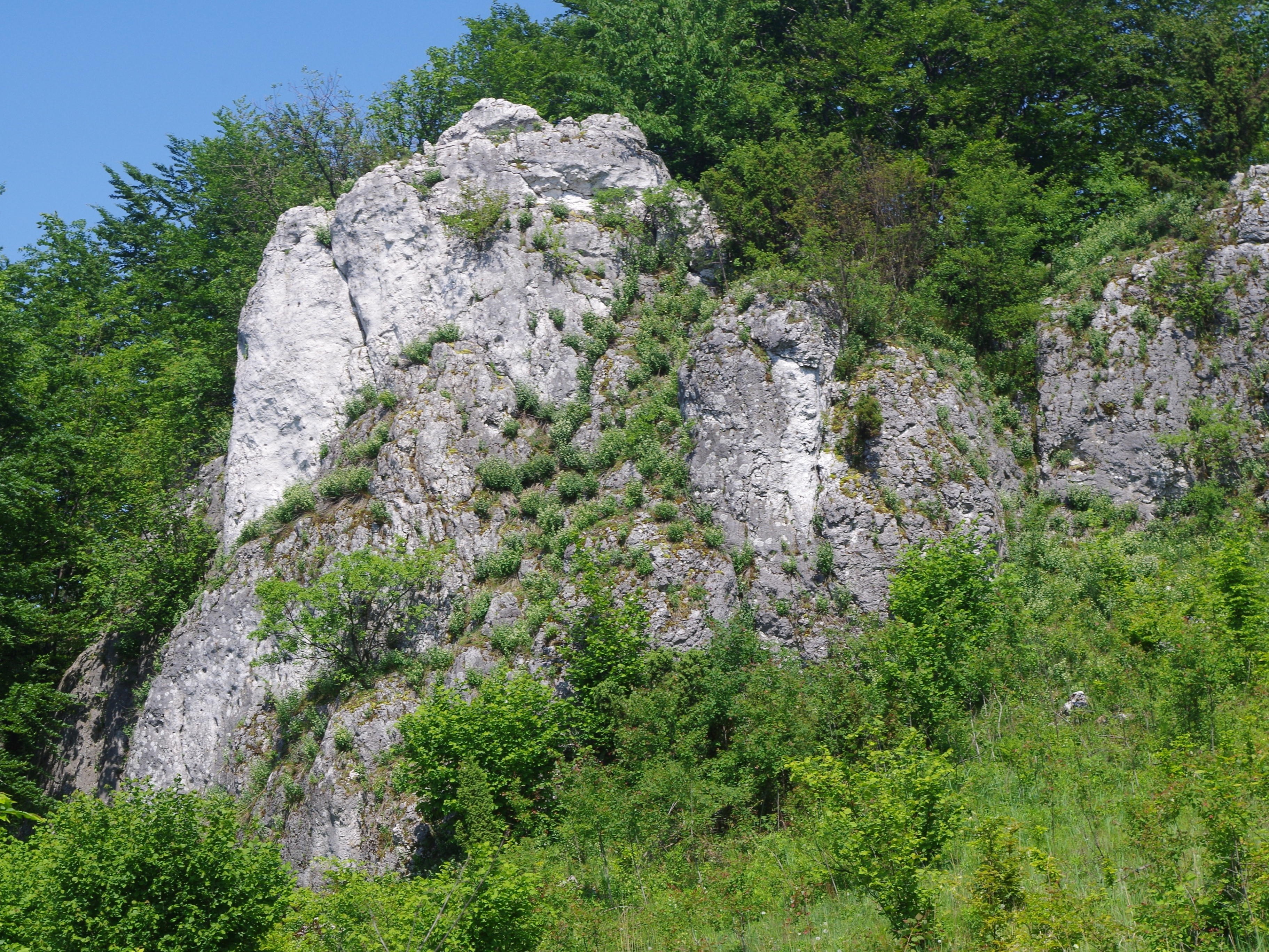 Skała Tapir w grupie Wielki Grochowiec w Ryczowie